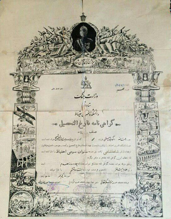 تصویری از یک گواهی فارغ التحصیلی دانشکده افسری در سال ۱۳۱۶